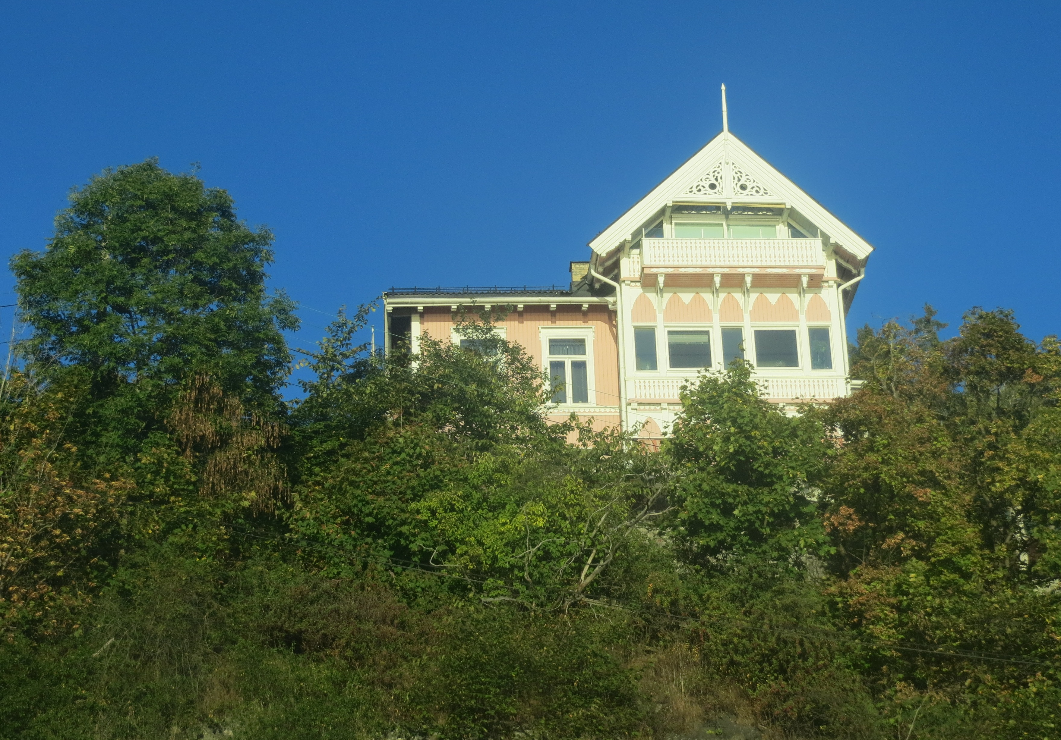 Bygning med funnsted på nedre Bekkelaget, nær Mosseveien, Oslo.